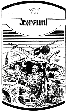 Ілюстрація до 5-ї частини книги братів Стругацьких "Населений острів".